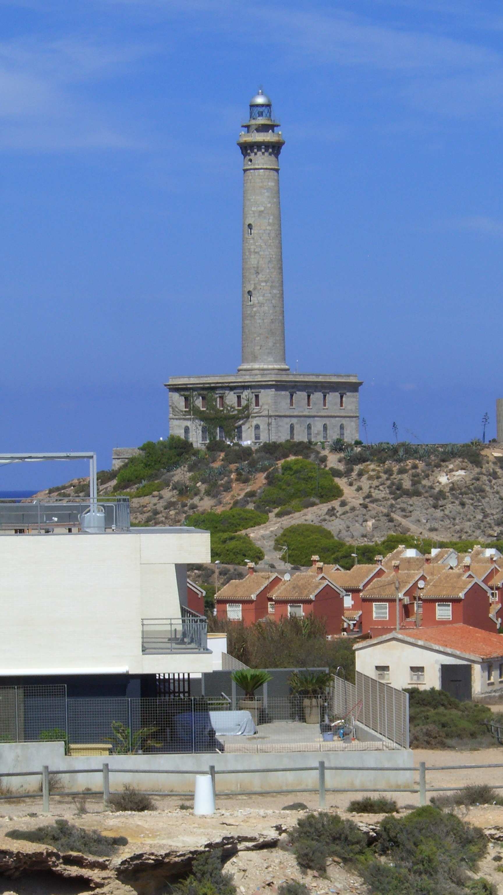 Faro de Cabo de Palos